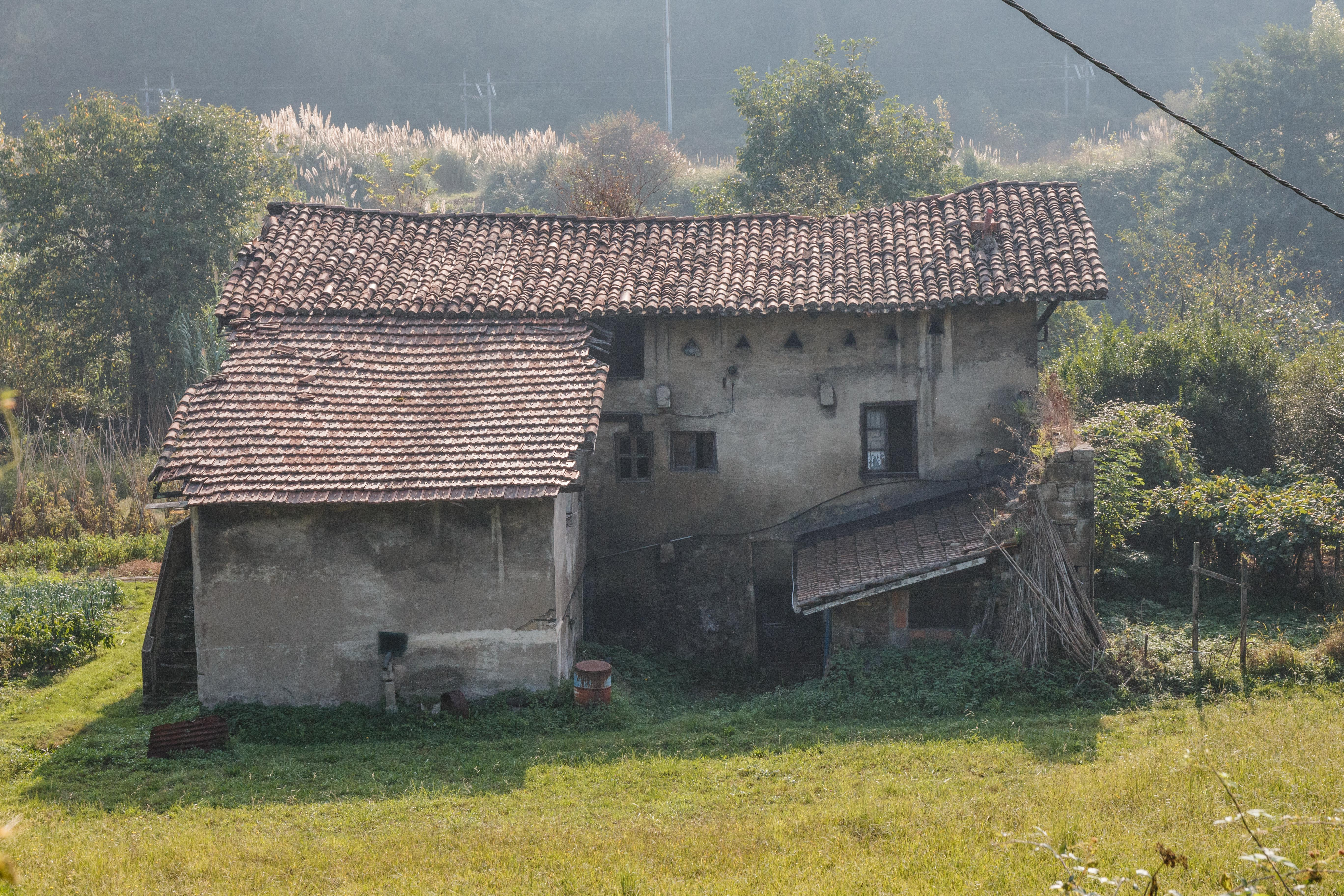 Zubileta dorrea